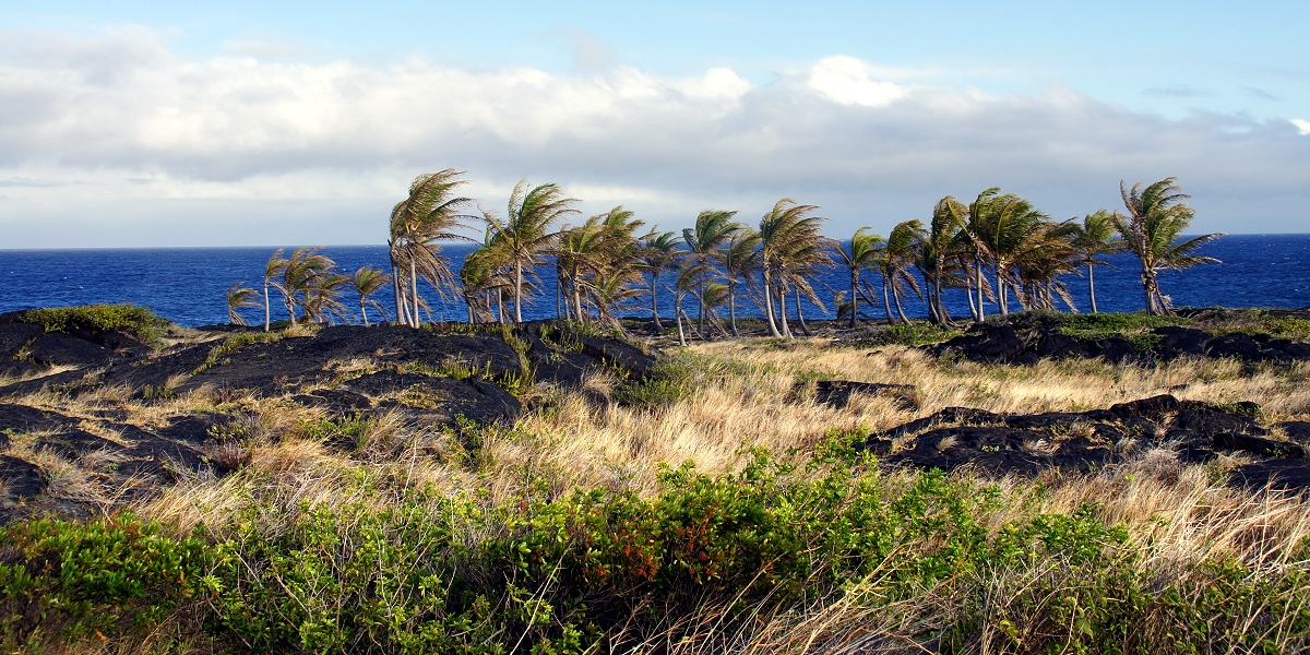 Остров Гвайи. Иллюстрация Второва И.П. для учебника Гавайеведение.